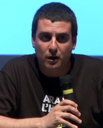 Quim Arrufat